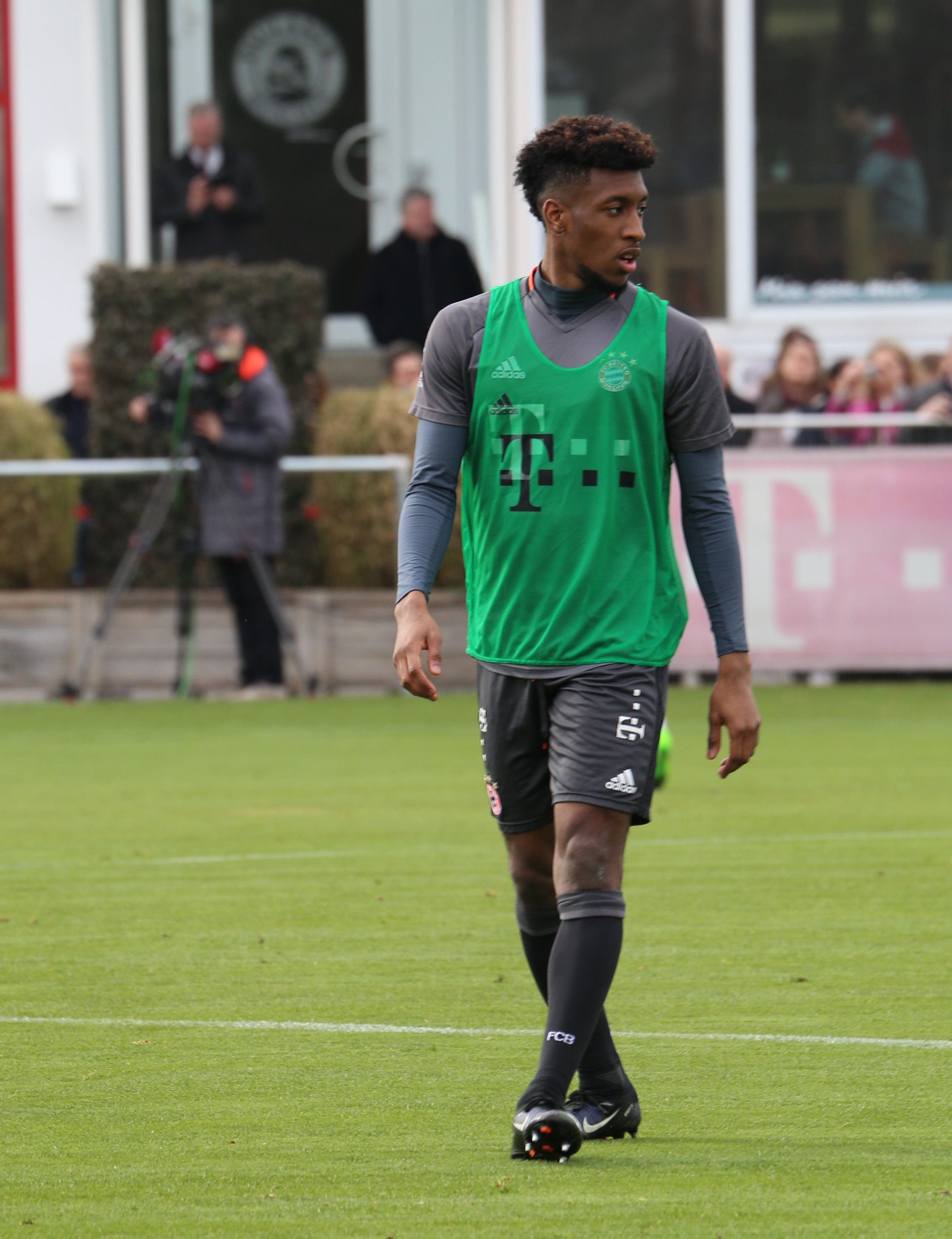 Kingsley Coman am 14. März 2017 beim Training auf dem Gelände des FC Bayern München